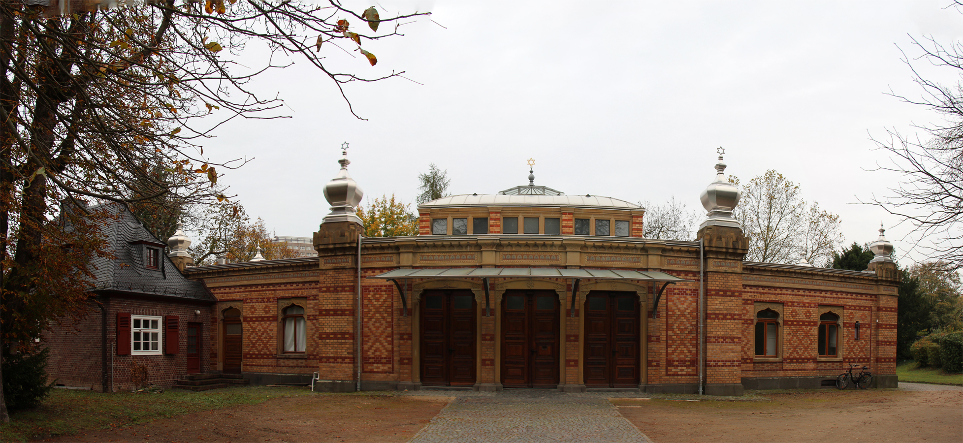 Trauerhalle auf dem Jüdischen Friedhof in Mainz. Jüdischer Friedhof (Mainz)